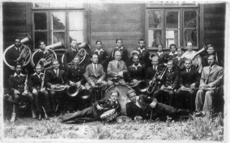 Беларуская (тарашкевіца): Школьны аркестар пружанскай гімназіі імя Адама Міцкевіча